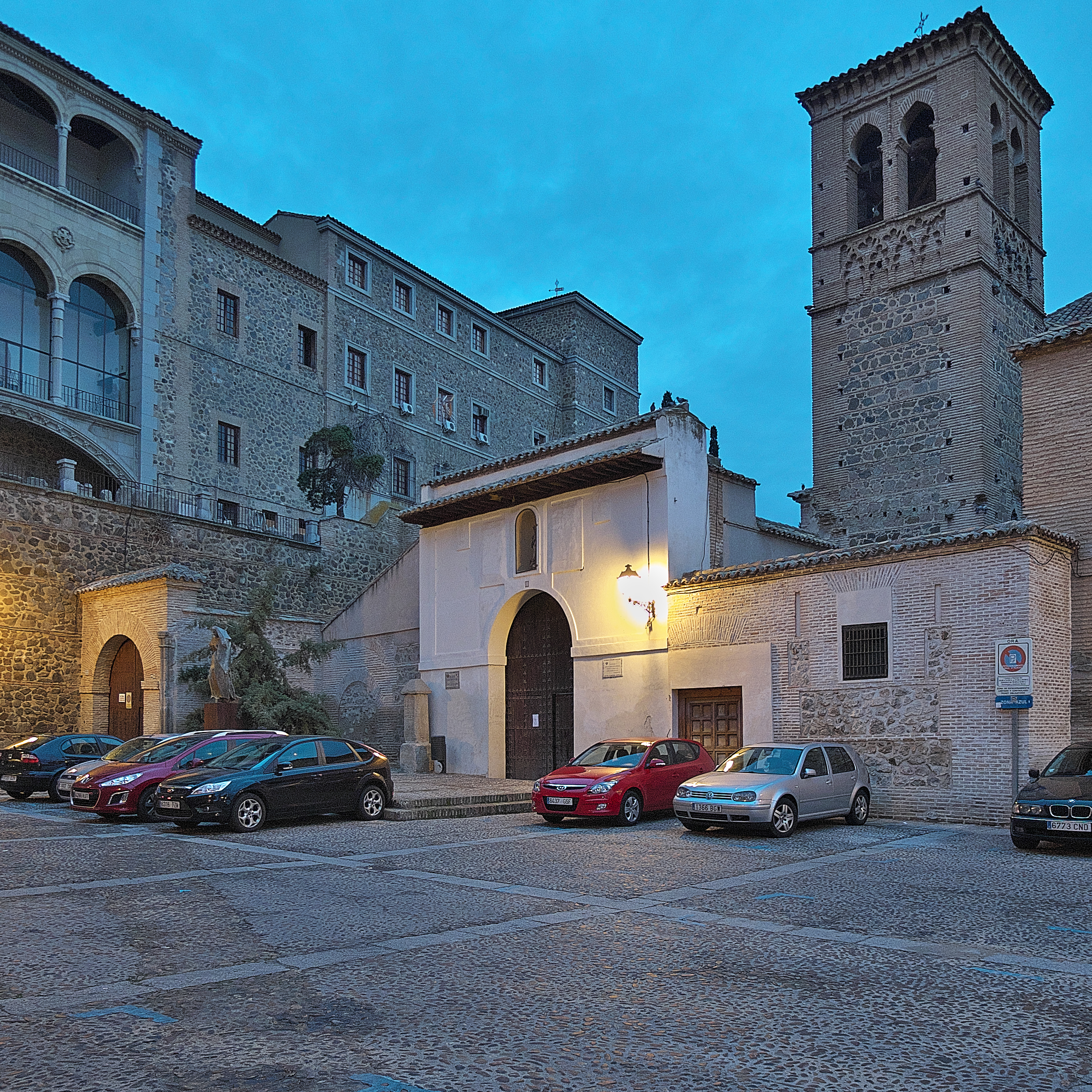 Beatriz de Silva funda en Toledo la Orden de la Concepcionistas (1489)